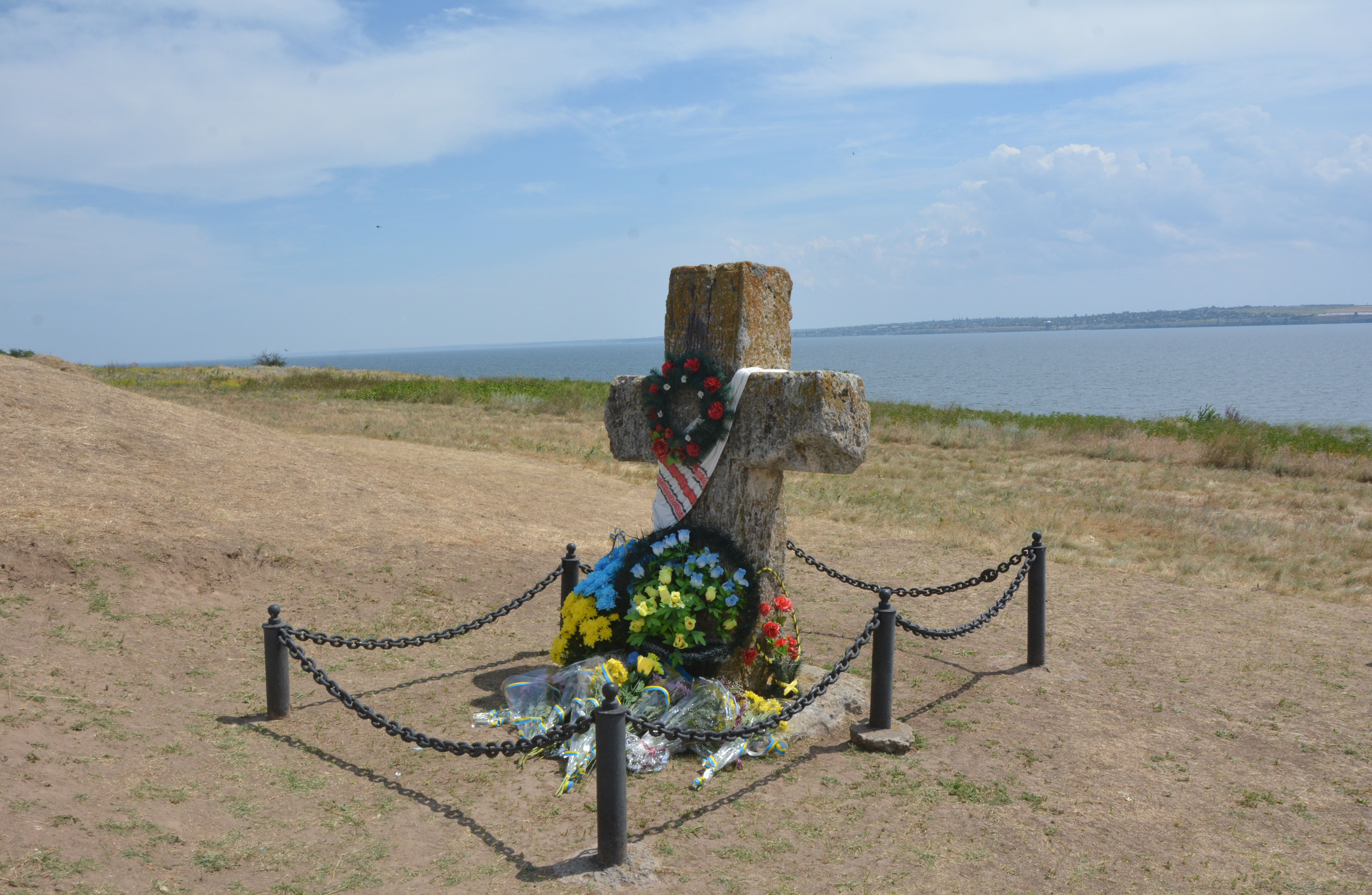 Кам'янська Січ, кладовище запорізьких козаків і могила кошового отамана Костя Гордієнка, с.Республіканець